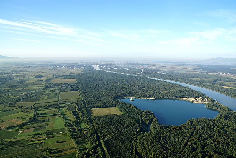 Luftbild von Burkheim aufgenommen bei einer Ballonfahrt